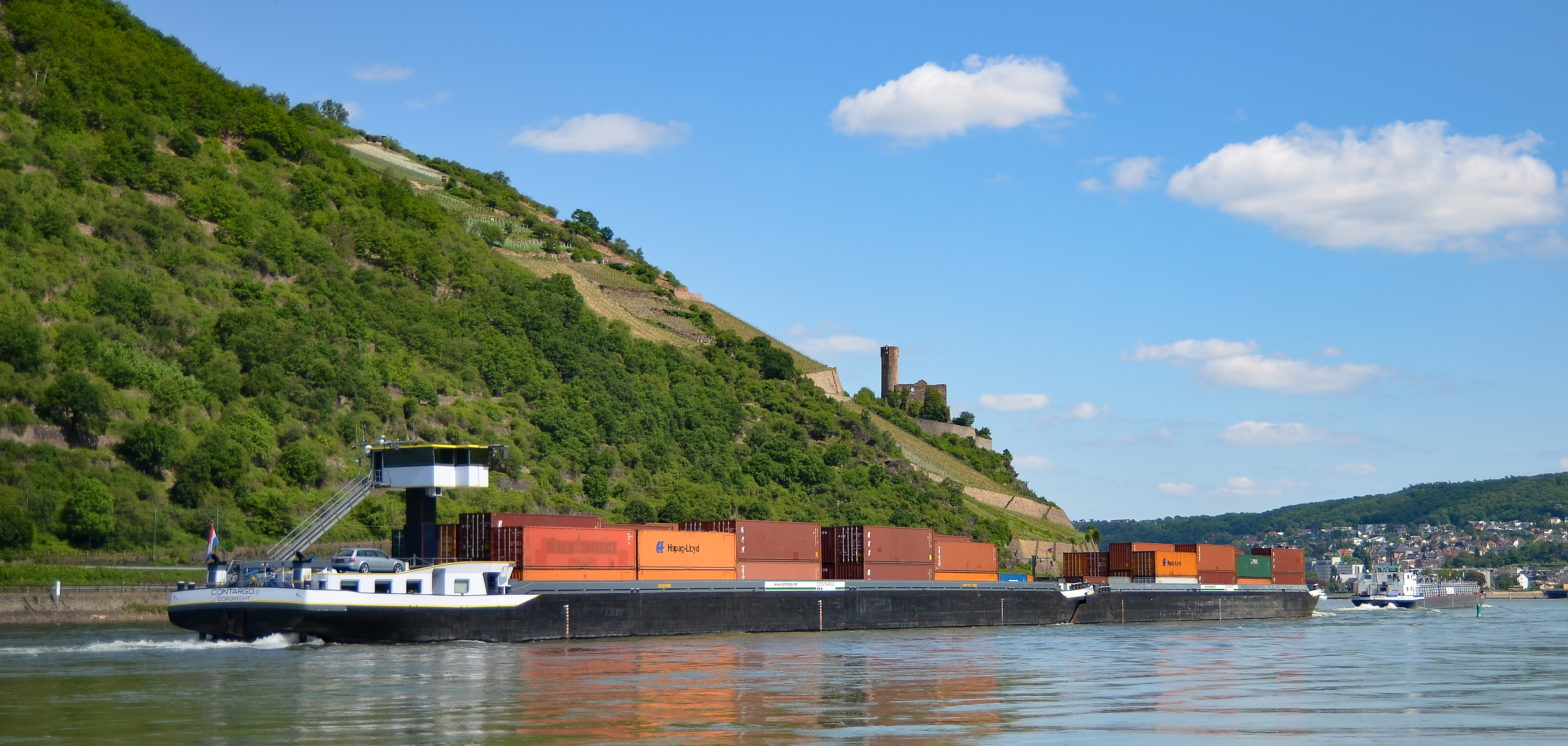 Binnenschiff Contargo II vor dem Binger Loch, im Hintergrund Burg Ehrenfels